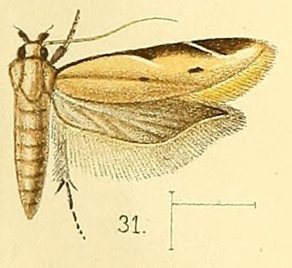 Mesophleps palpigera